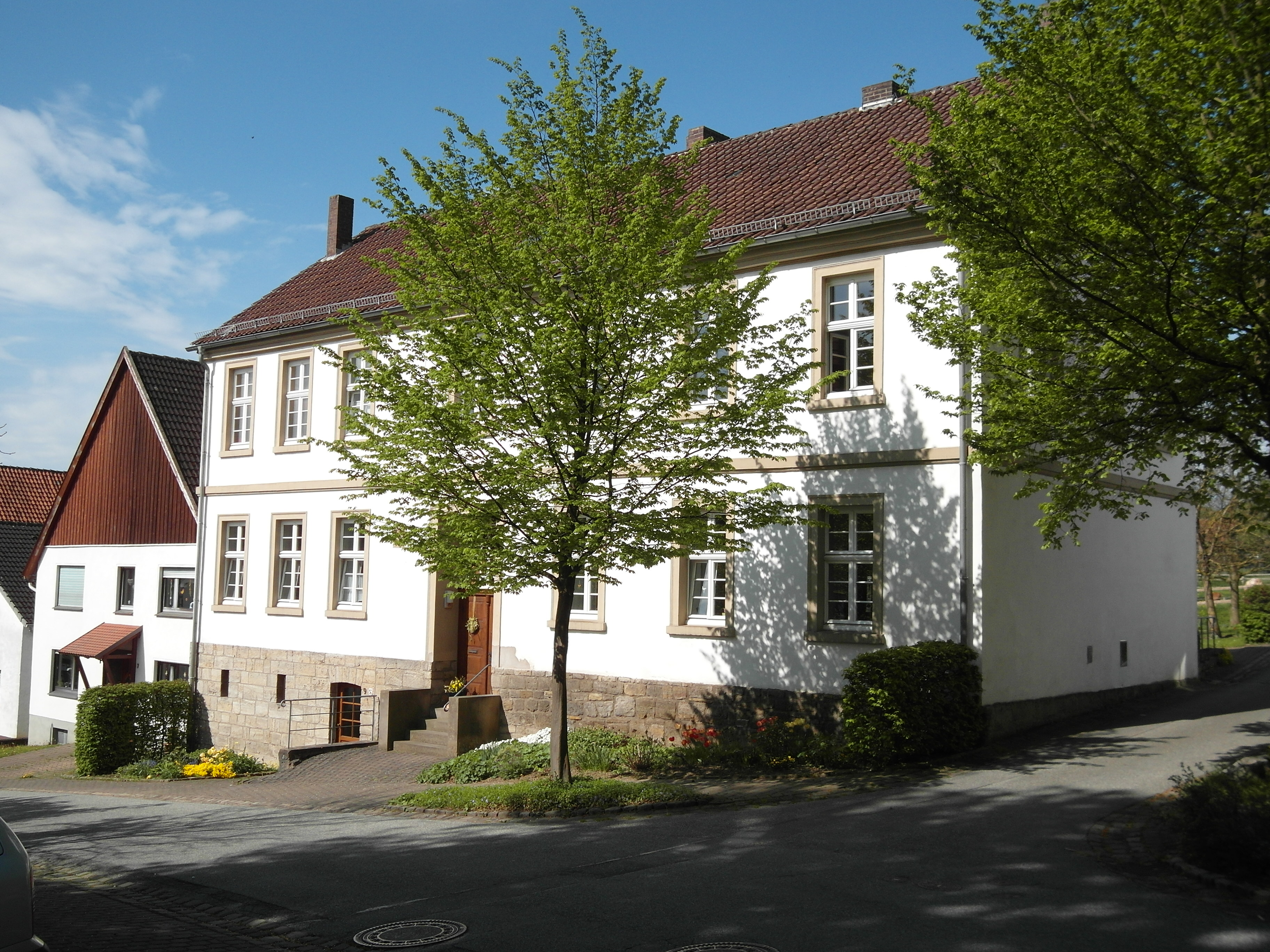 Dieses Foto zeigt die alte Schule in Bellersen. This is a photograph of an architectural monument.